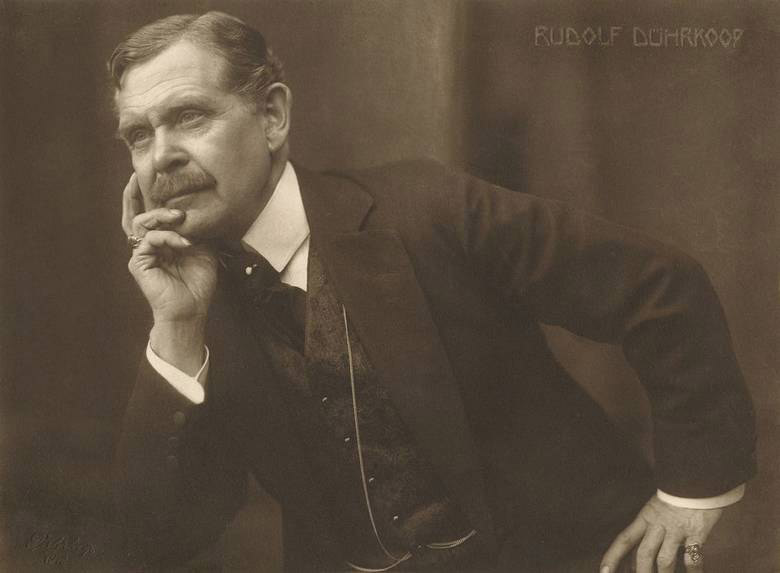 Self-portrait